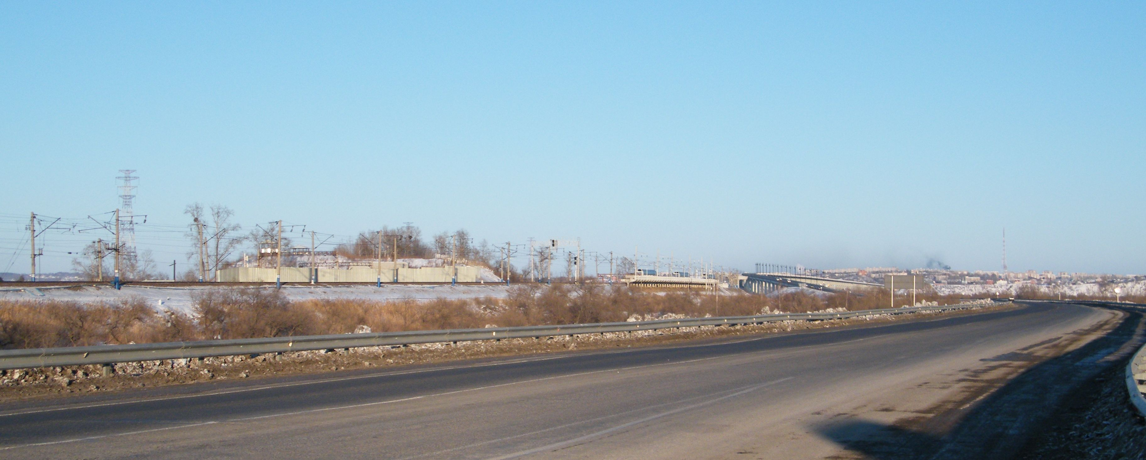 Тоннель под Амуром и хабаровский мост (левый берег)